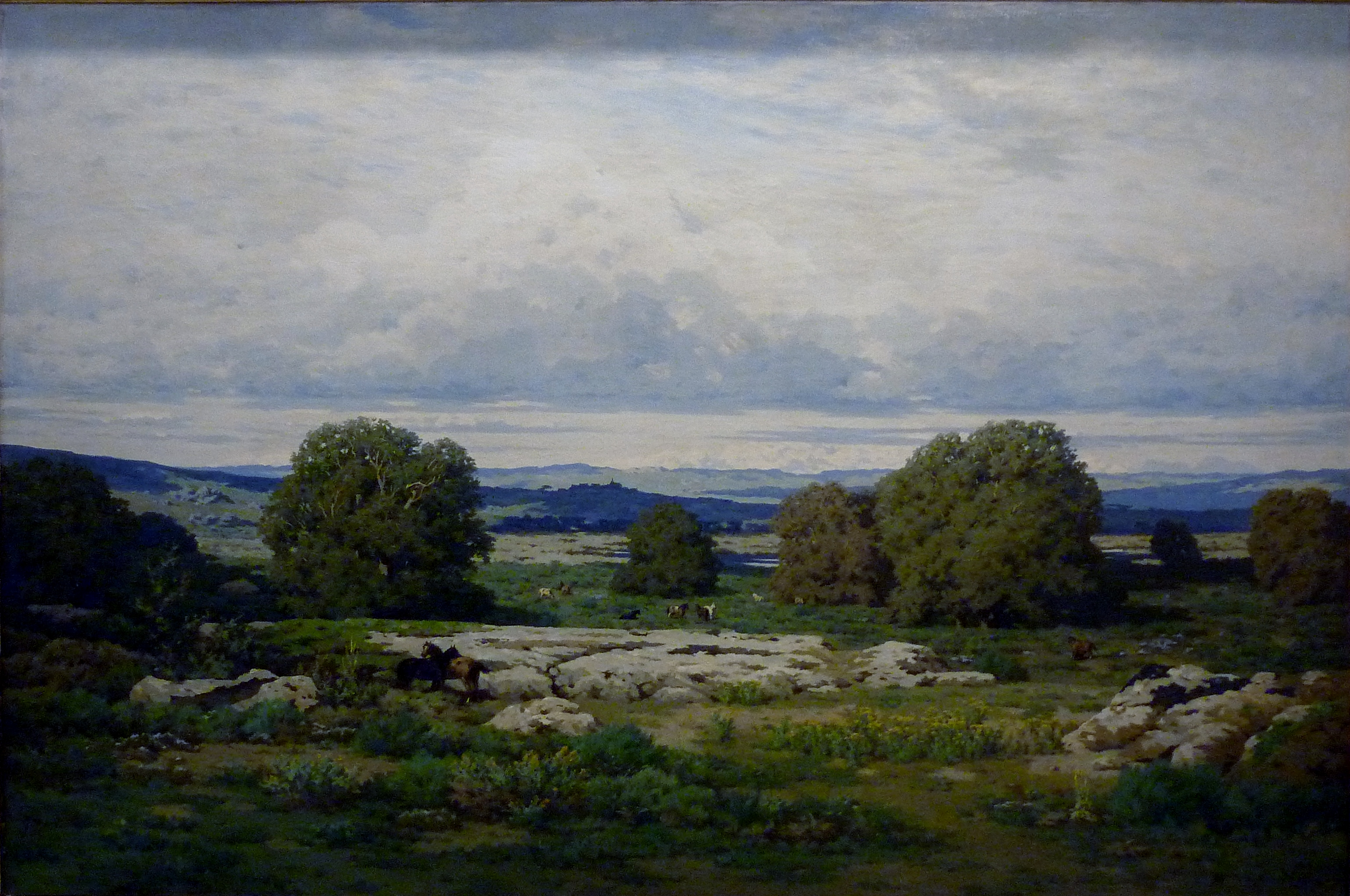 Alexandre Ségé : La vallée de Ploukermeur. Montagnes d'Arrée. Vers 1883 (Musée des Beaux-Arts de Quimper) [le bourg de Scrignac est visible au second plan et les rochers du Cragou à l'arrière-plan].